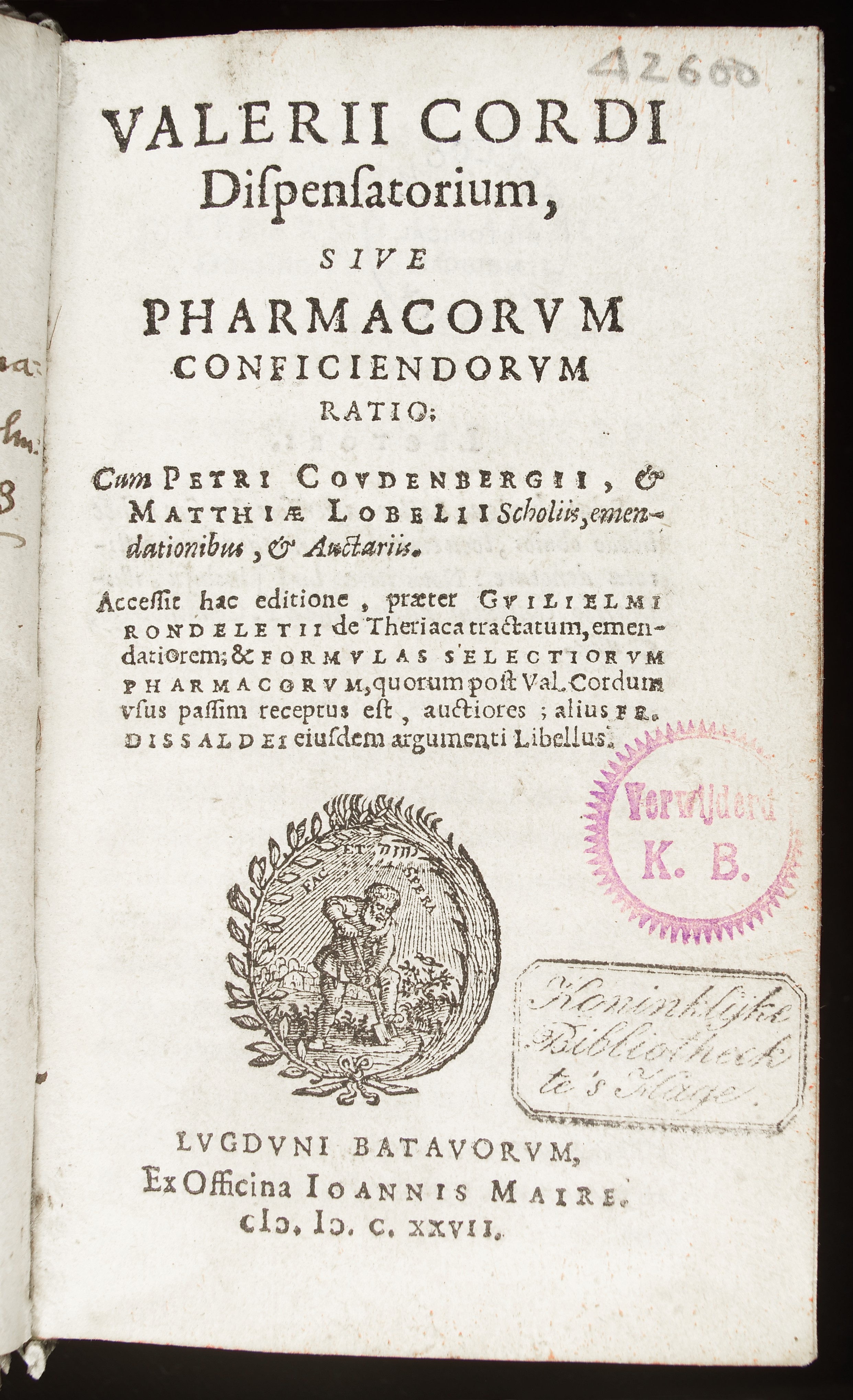 Valerii Cordi Dispensatorium, sive Pharmacorum conficiendorum Ratio. Maire, Lugduni Batavorum 1637 Wellcome Images